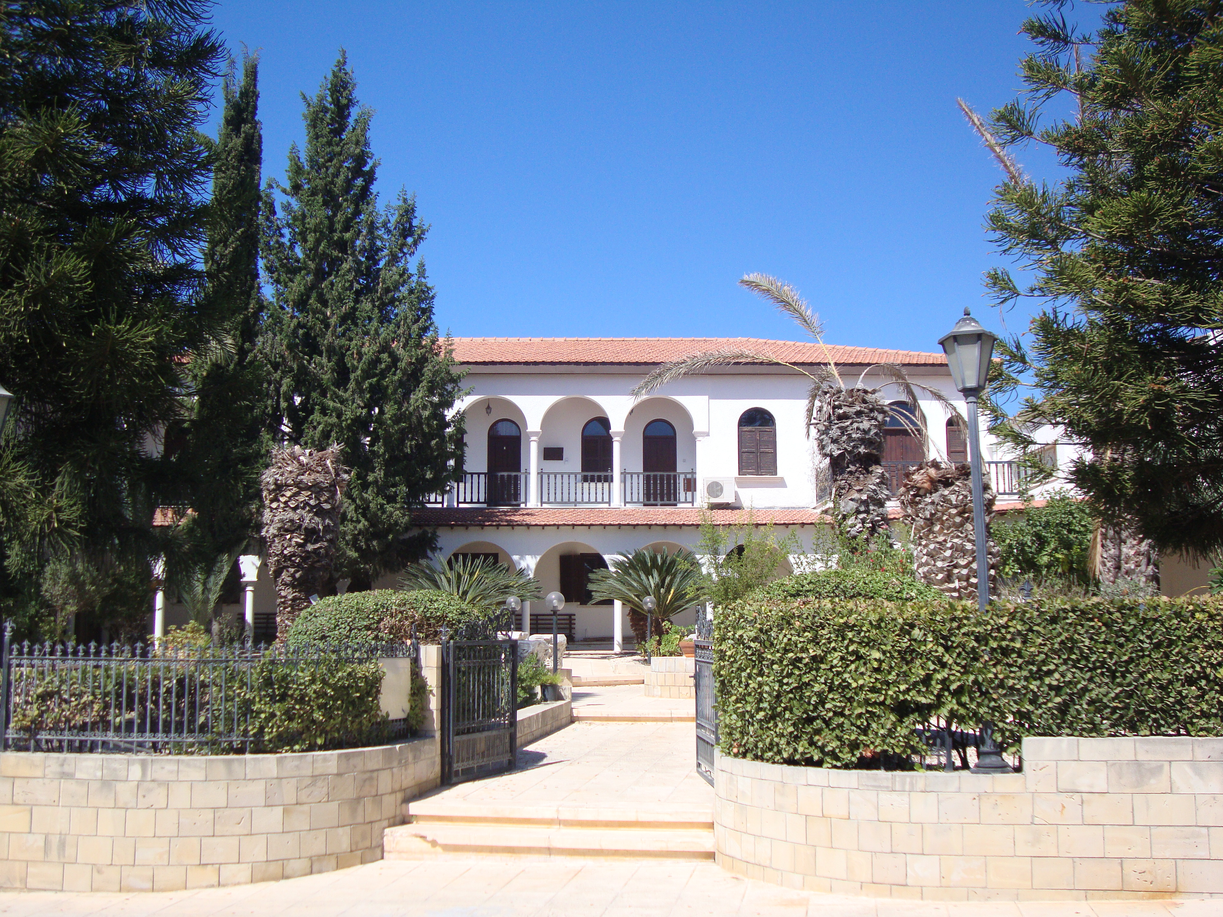 Византийский музей Пафоса (09.2013)